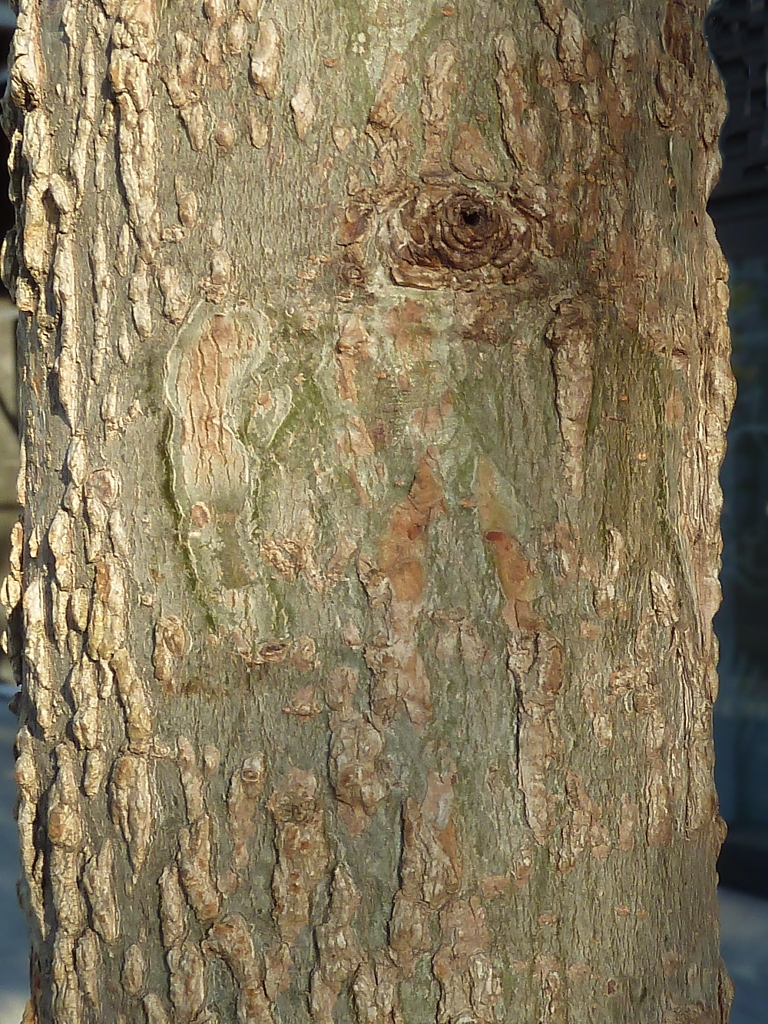 Liquidambar styraciflua (Liquidámbar) : Corteza del tronco - Plaza de Felipe II, Madrid (España).